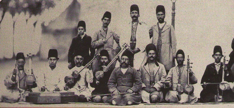 « 18 ذیحجه،در روز طبخ آش ییلاقی در شهرستانک گرفته شده » از راست : حسین کریم کور و قلی خان نوازنده ( کمانچه ) نشسته اند،سماع حضور که دستش را روی پاهایش گذاشته نفر بعدی است.او از بزرگترین نوازندگان سنتور دوره قاجار و پدر حبیب سماعی از نوازندگان دوره پهلوی اول بود.مهم ترین موسیقیدان این گروه محمد صادق خان سرورالملک «رئیس گروه نوازندگان دربار»است، عصایی که دست دارد و اینکه جلوتر از سایرین نشسته ، جایگاه او را در جمع نشان می دهد. آقا حسین قلی و میرزا عبدالله نوازنده( تار ) پسران علی اکبر خان فراهانی در کنار او نشسته اند . آقا مطلب پسر محمد صادق خان نوازنده سنتور و آقا غلامحسین نوازنده کمانچه «پدر سماع حضور که سازی ابداعی شبیه کمانچه در دست دارد » ،نفرات بعدی هستند. ایستاده ها از راست: ابراهیم کربلایی سعید ،میرزا ابوالقاسم ضرب گیر (خواننده) ، یوسف خان معیری خواننده و پسر نوجوان هم عبدالله پسر کوچک محمد صادق خان است.